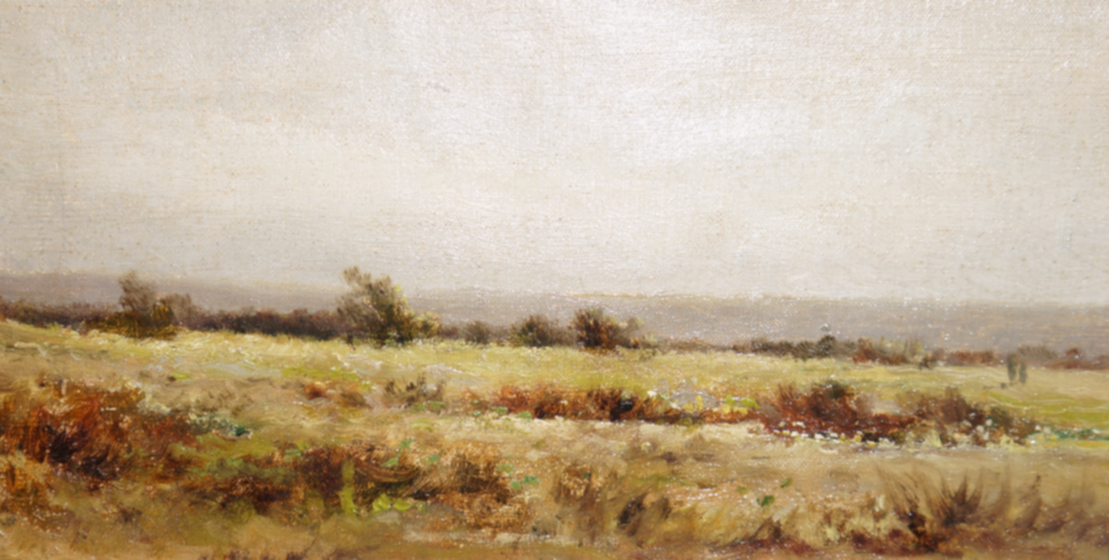 Obra del pintor O´Neille "Paisatge"